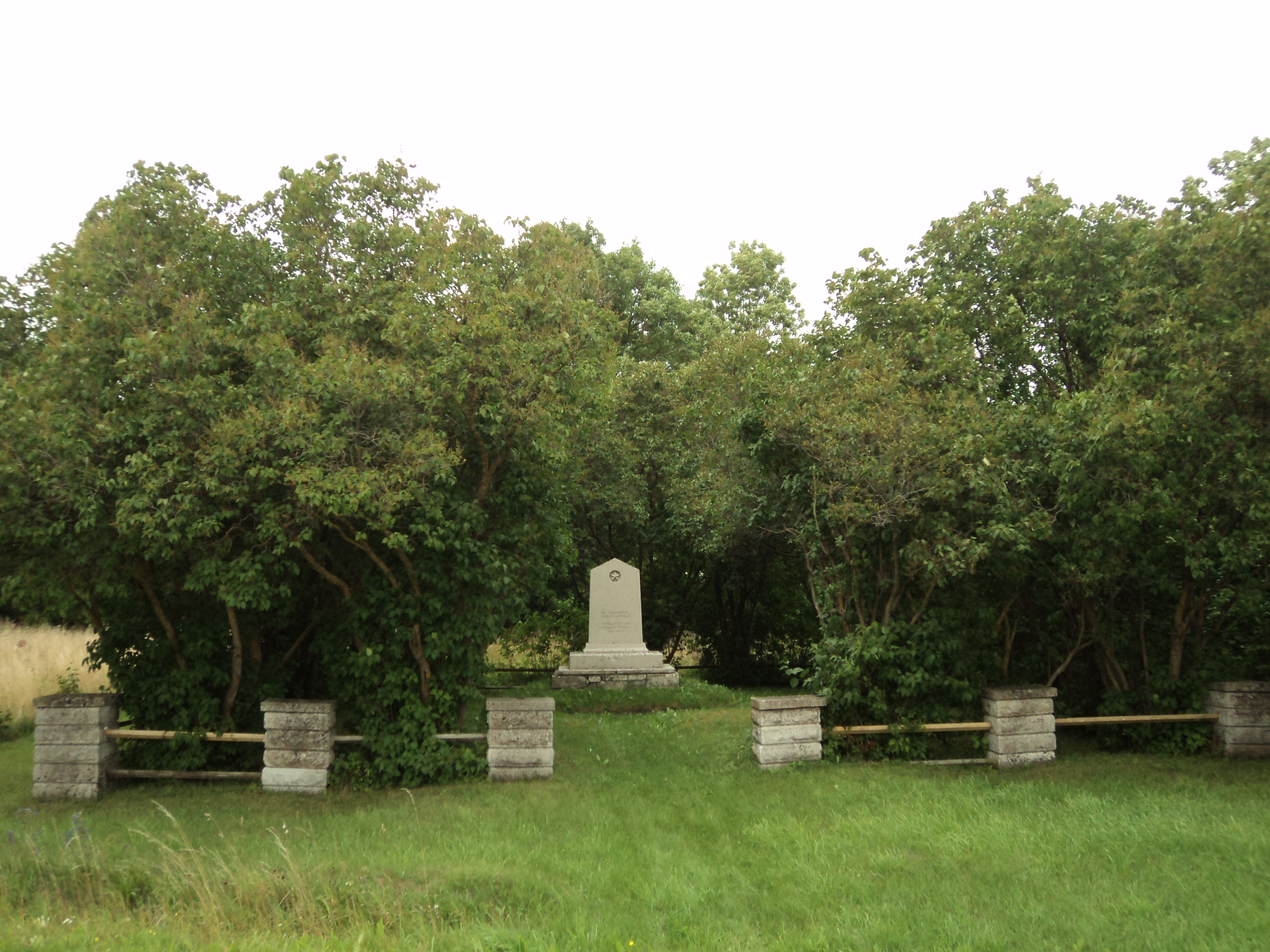 II maailmasõjas hukkunute ühishaud